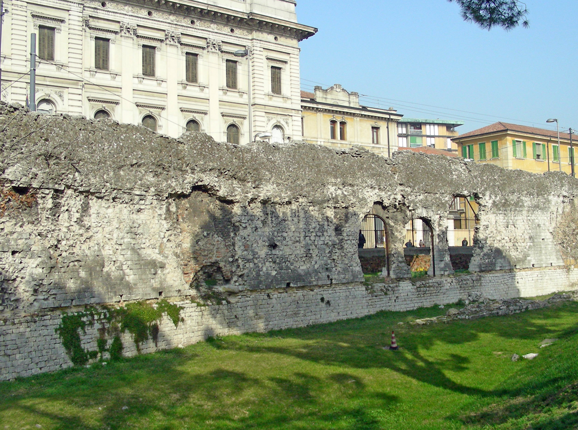 Wall of the ancient amphitheatre in Padua